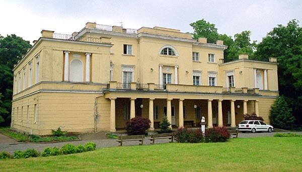 Jankowice Palace in Poland